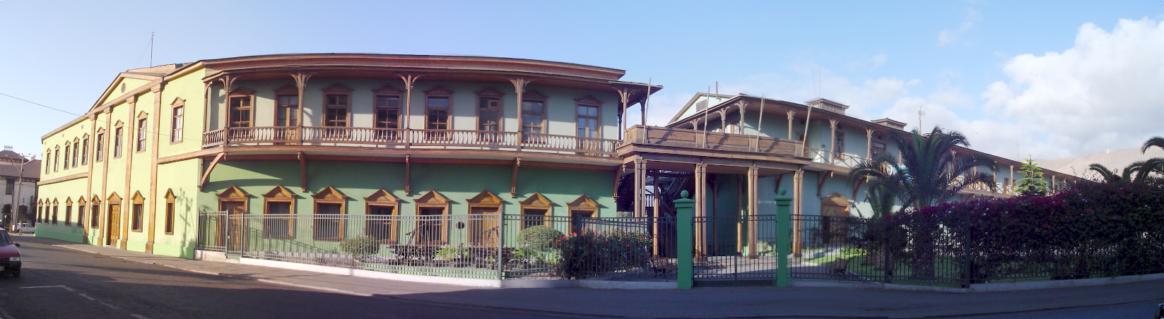 Estación de Ferrocarril de Antofagasta a Bolivia. Monumento histórico nacional. Antofagasta, Chile. Source: [1] Date: 28/10/2005 Author: Marcos Escalier